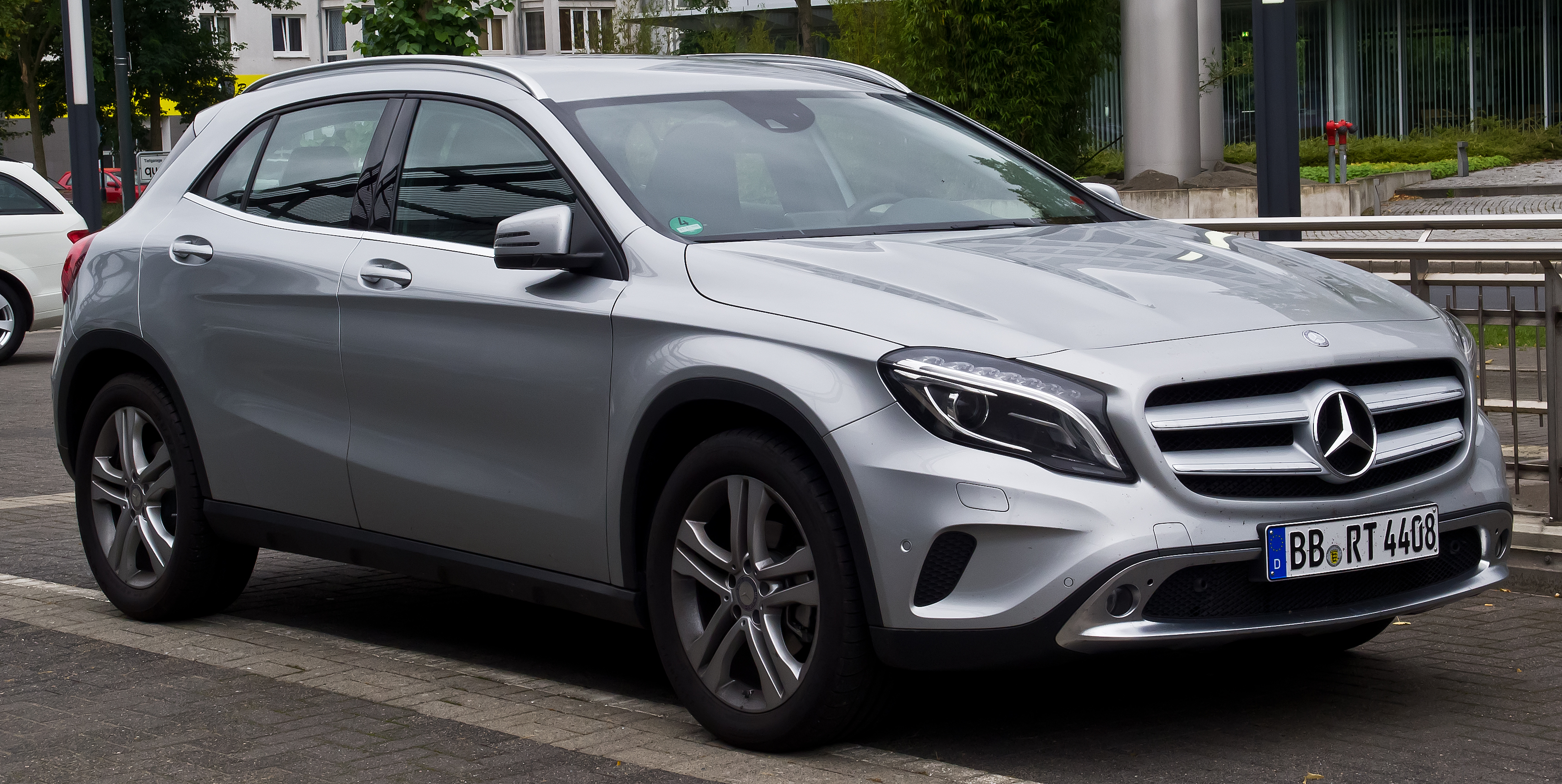 Mercedes-Benz GLA 200 CDI Urban (X 156)